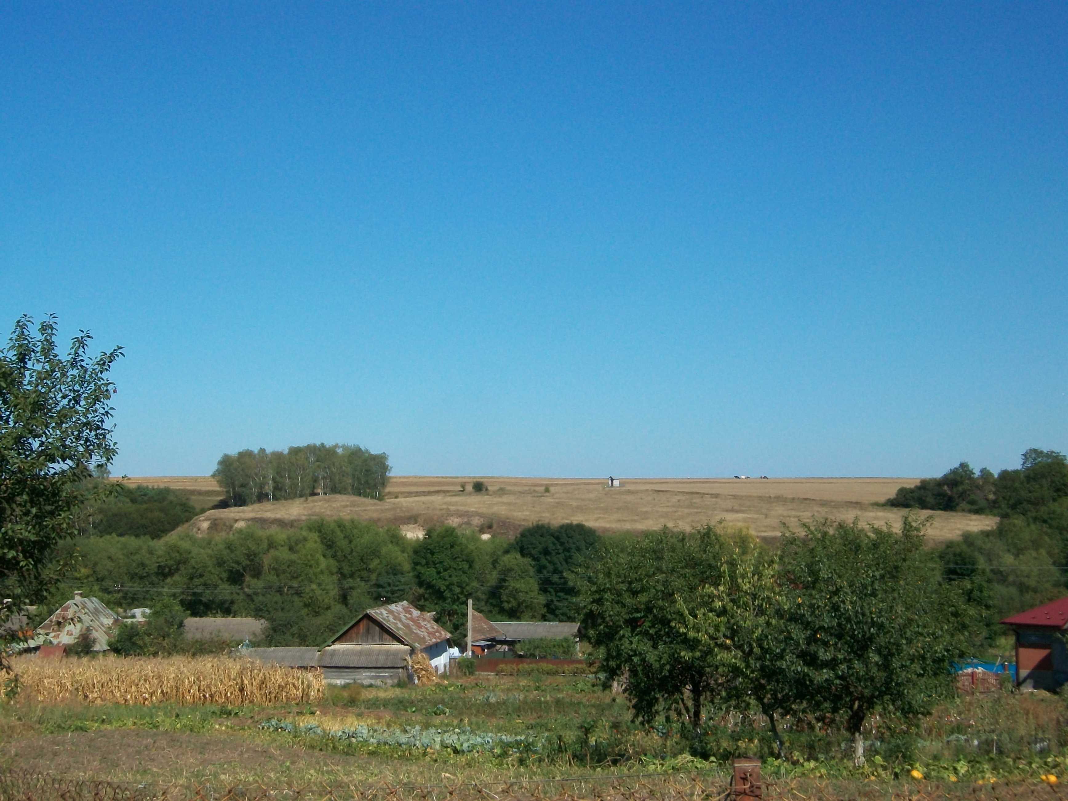 Вид на Шманьківський замок